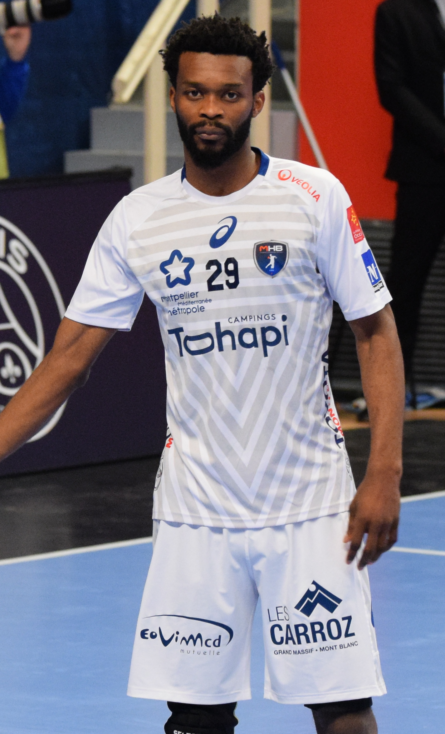 Rencontre de championnat entre le PSG et Montpellier. A Coubertin, le 1er mars 2018.